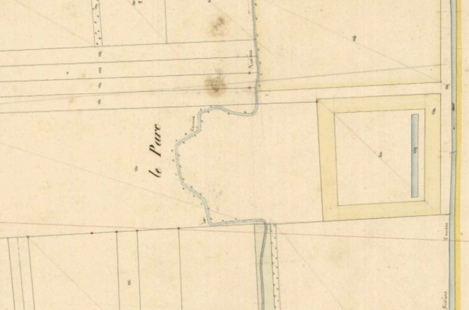 Emplacement du château d'Estissac en 1840.